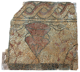 Делови од поден мозаик, базилика Св. Илија, с.Делогожди